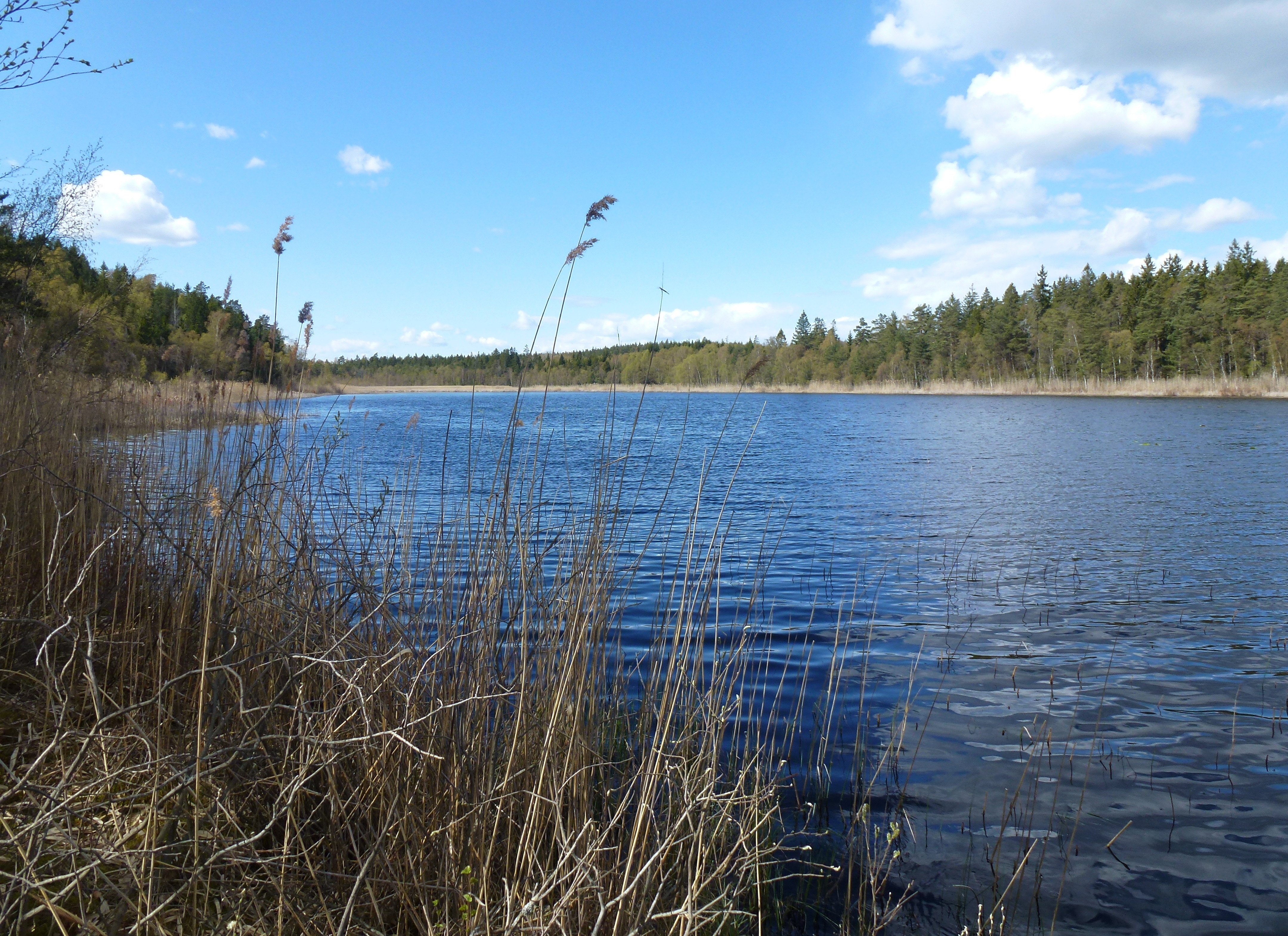 Stora Träsket naturreservat